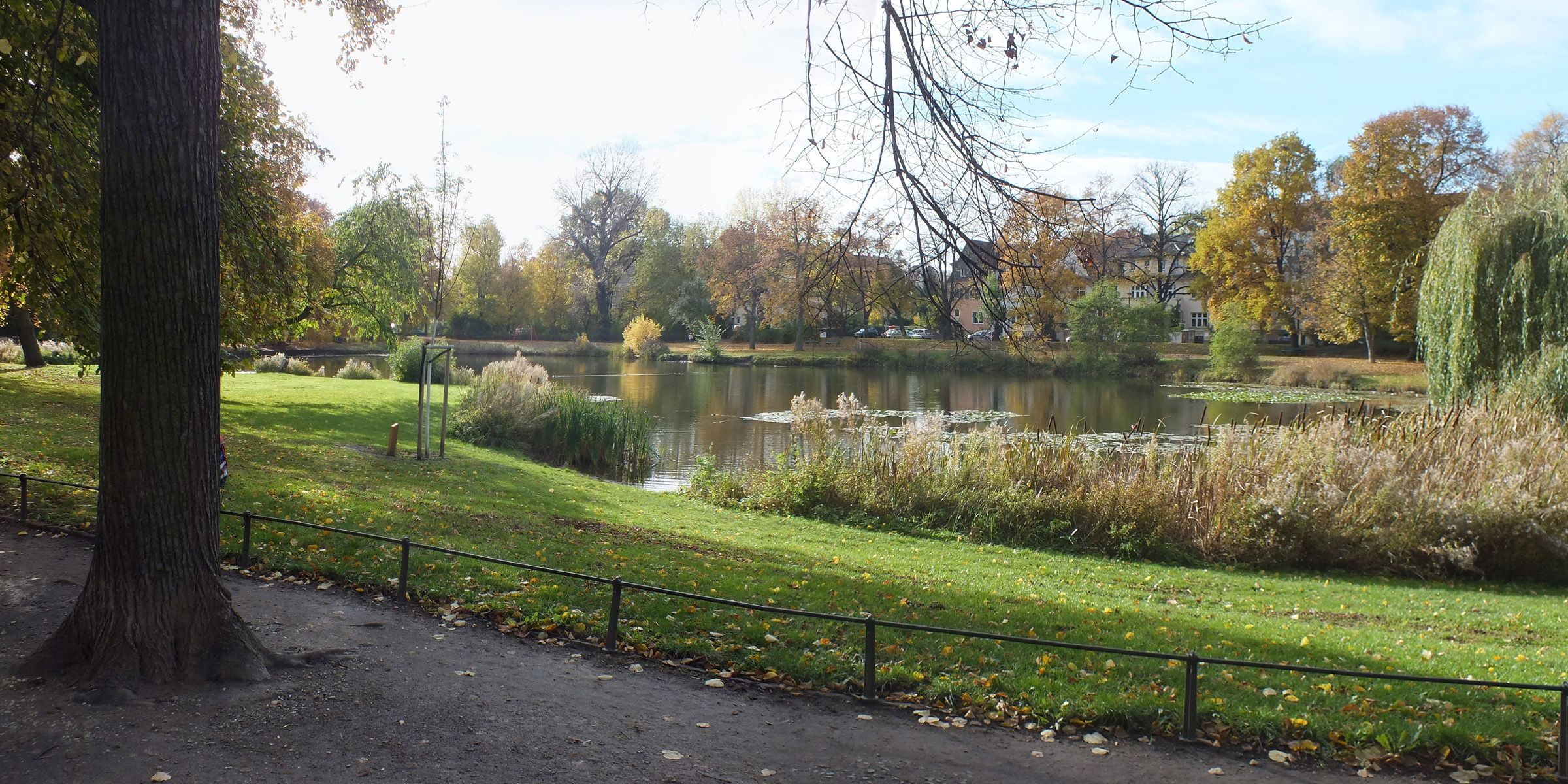 Arthur-Bretschneider-Park in Leipzig-Eutritzsch. Der Parkteich von Nordost